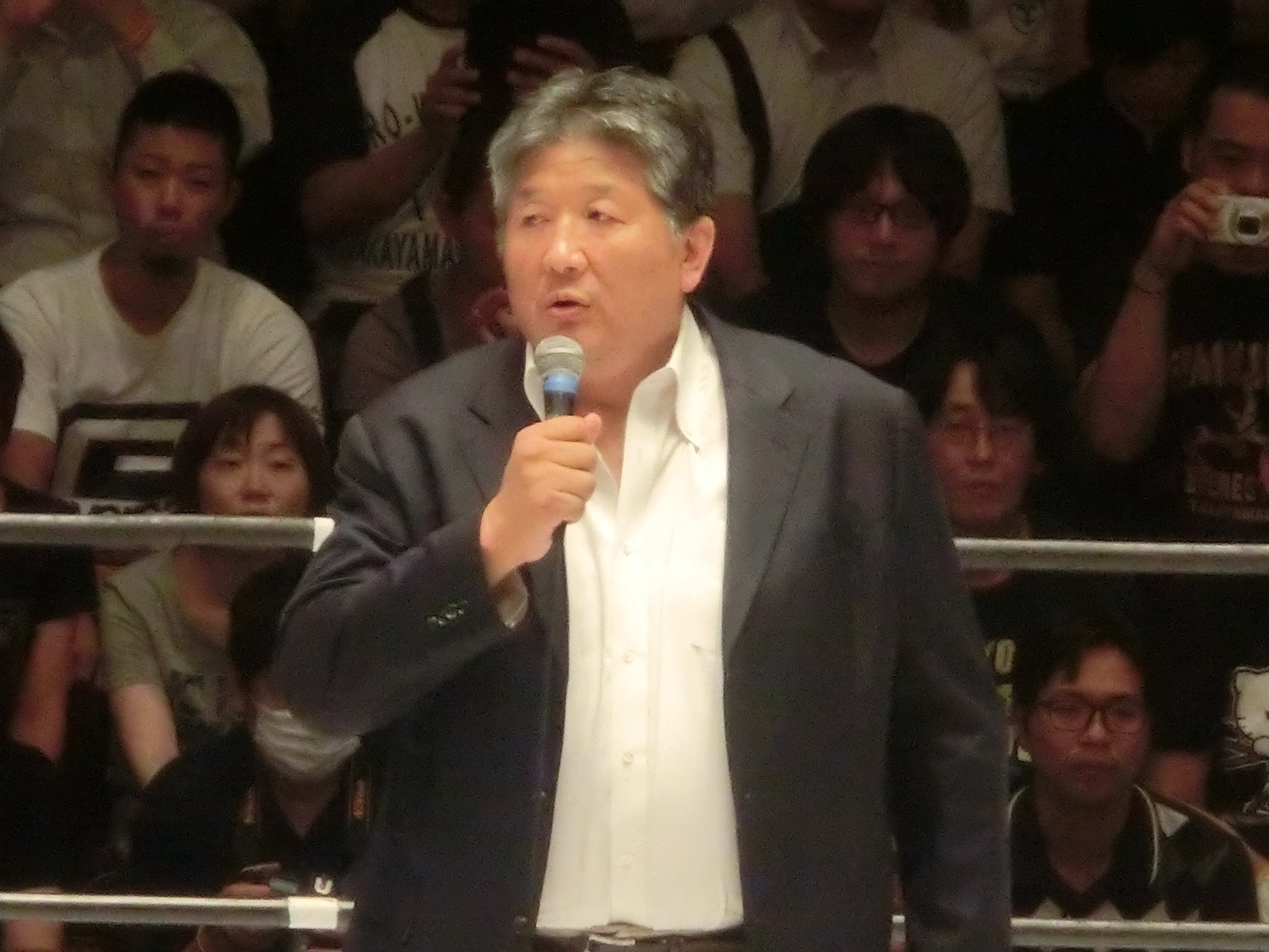 2018年8月31日、後楽園ホール